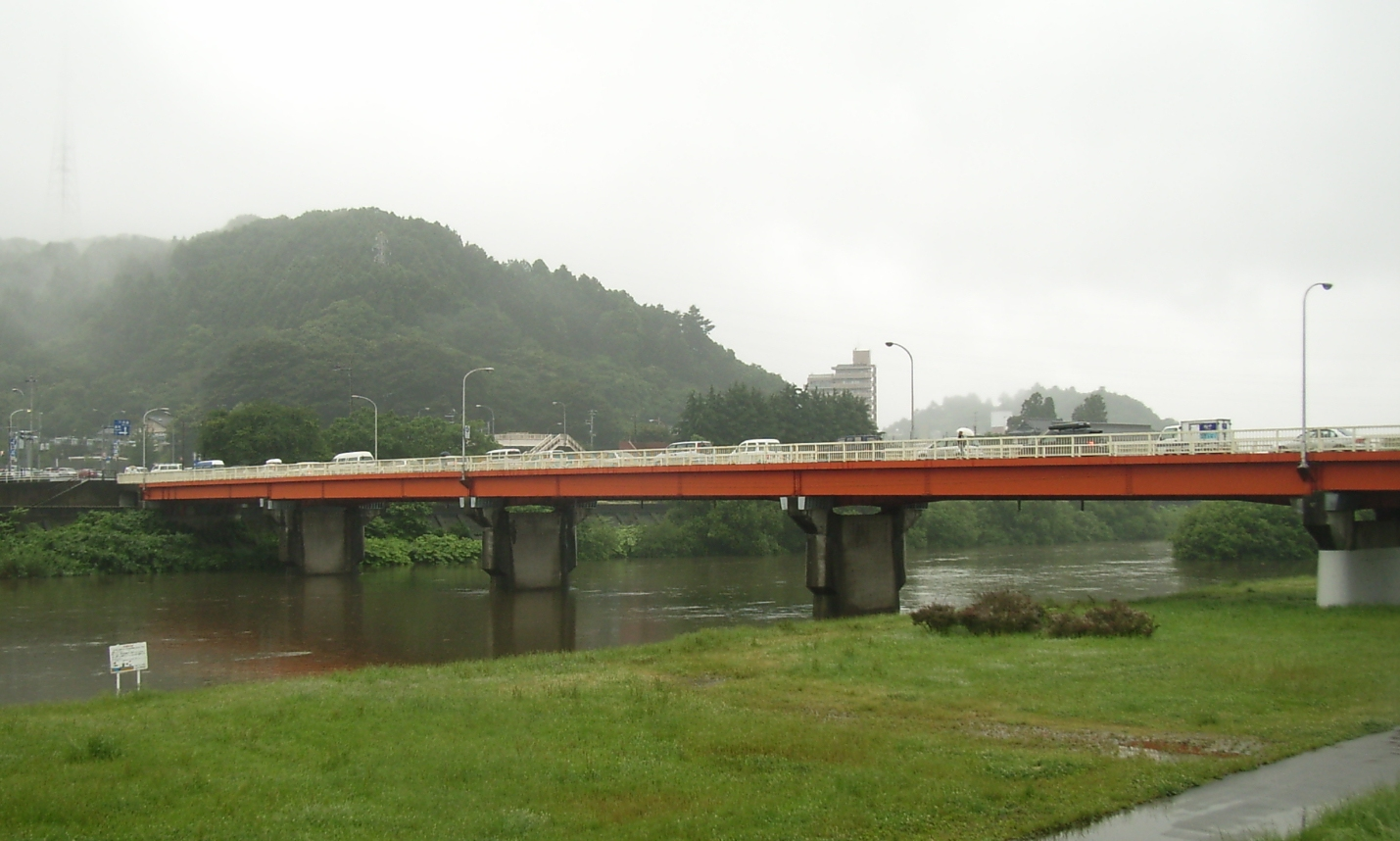 Miyazawa-Bashi Bridge. Sendai, Japan